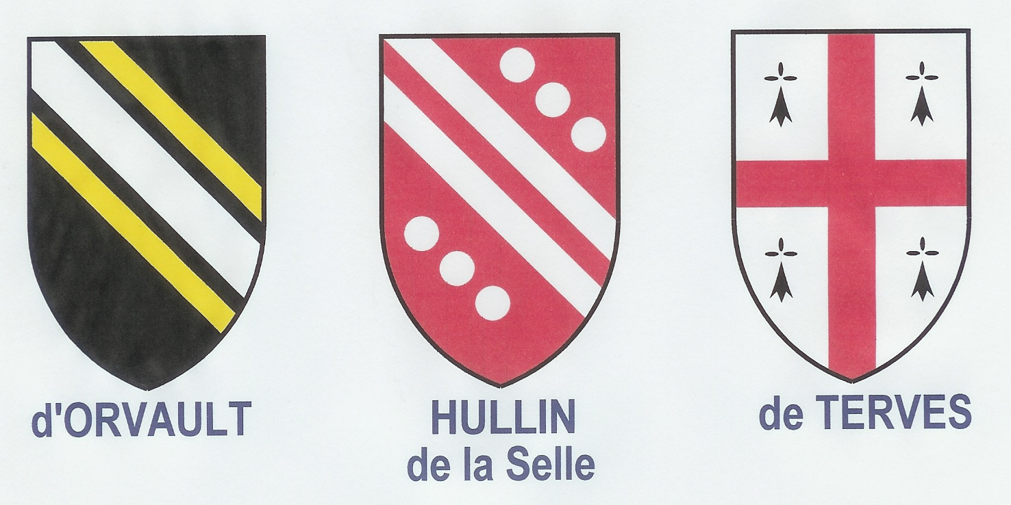 Les blasons de la famille Dorvaux, Hullin de la Selle, de Terves (France)